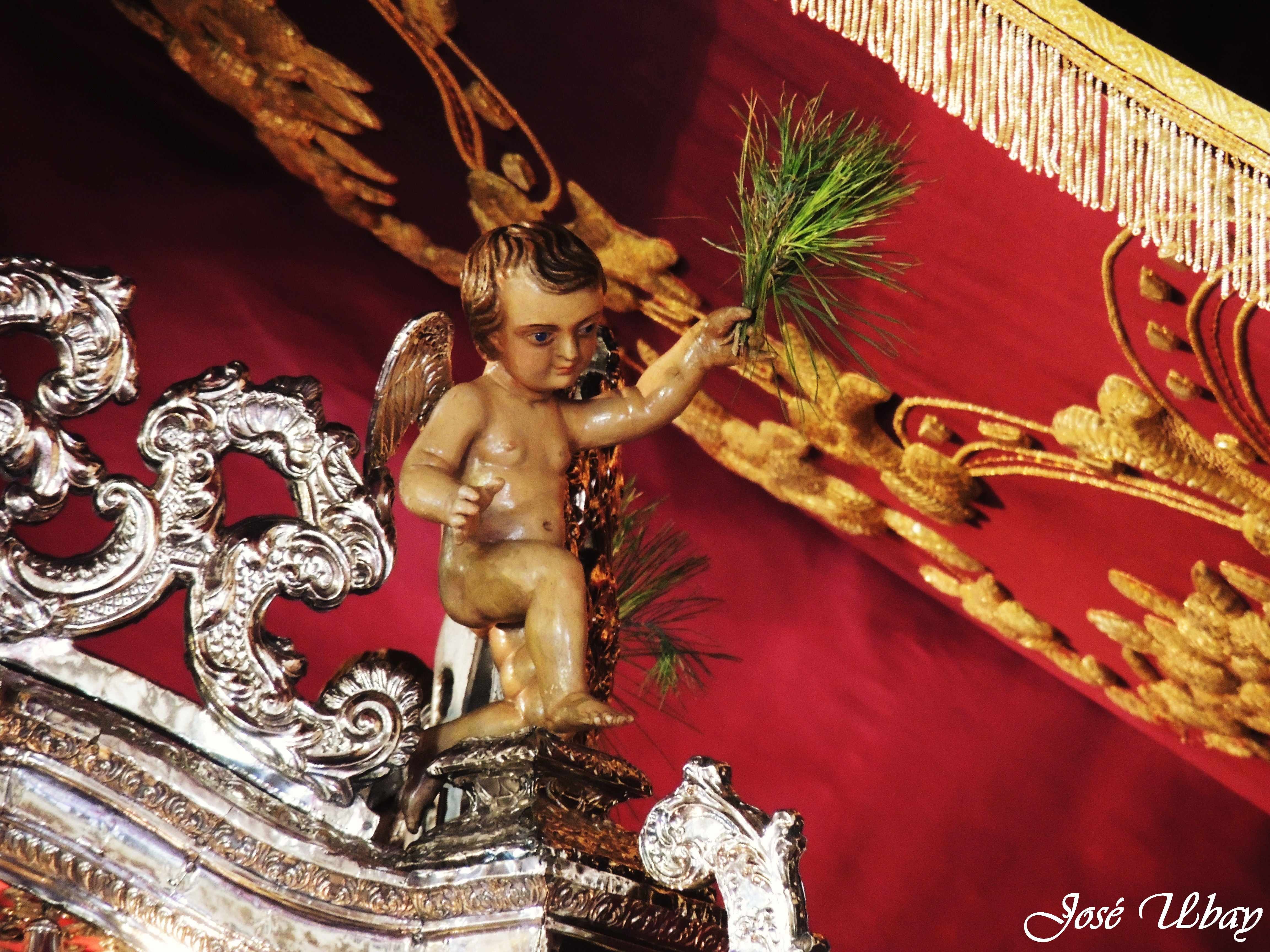 Ángel del baldaquino de Nuestra Señora del Pino. Anónimo. Siglo XVIII. Basílica de Nuestra Señora del Pino. Villa Mariana de Teror, Gran Canaria.